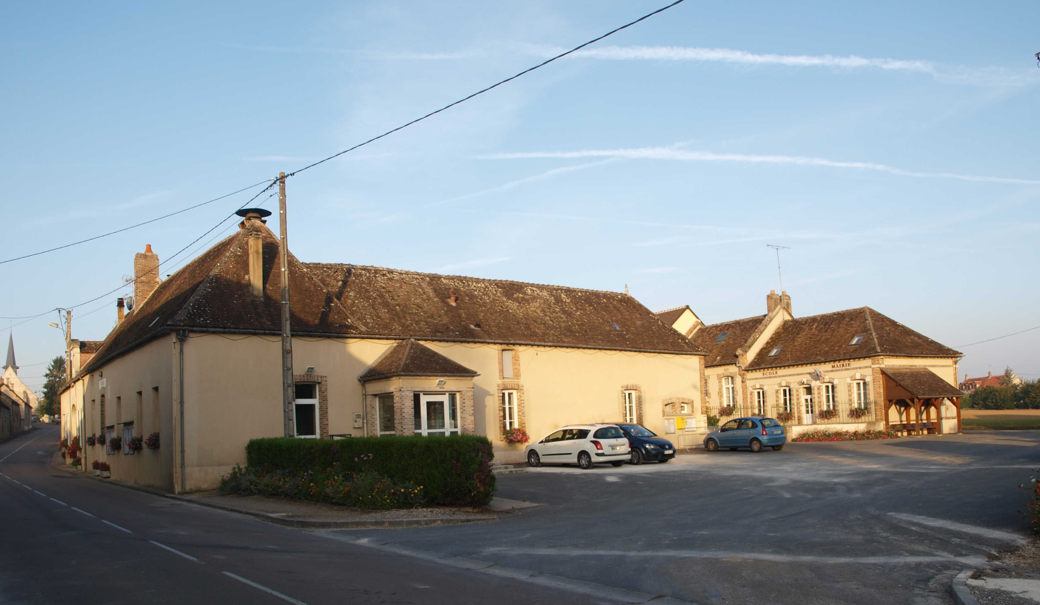 Dollot (Yonne, France)